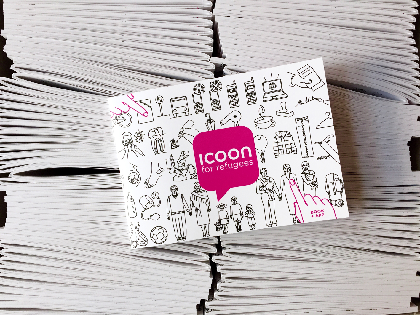 ICOON for refugees Cover